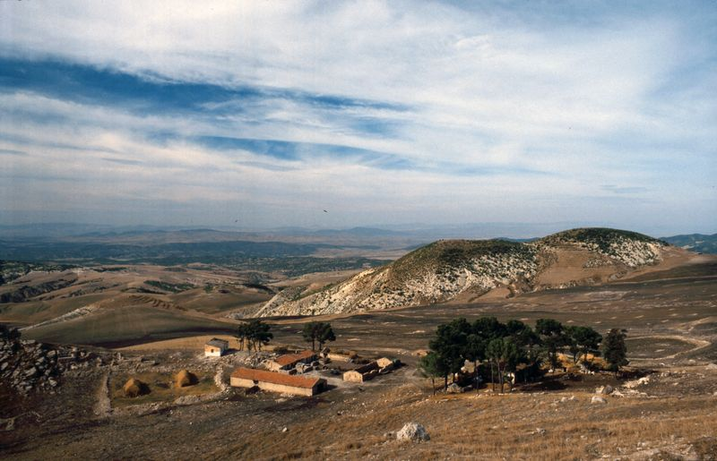 Ancienne ferme française dans la région du Kef en Tunisie